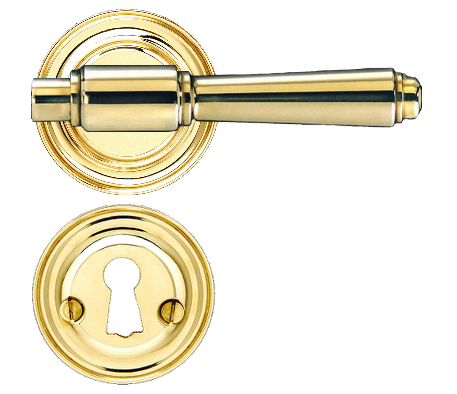 Søe-Jensen & Co dørgreb i massiv messing med roset og nøgleskilt